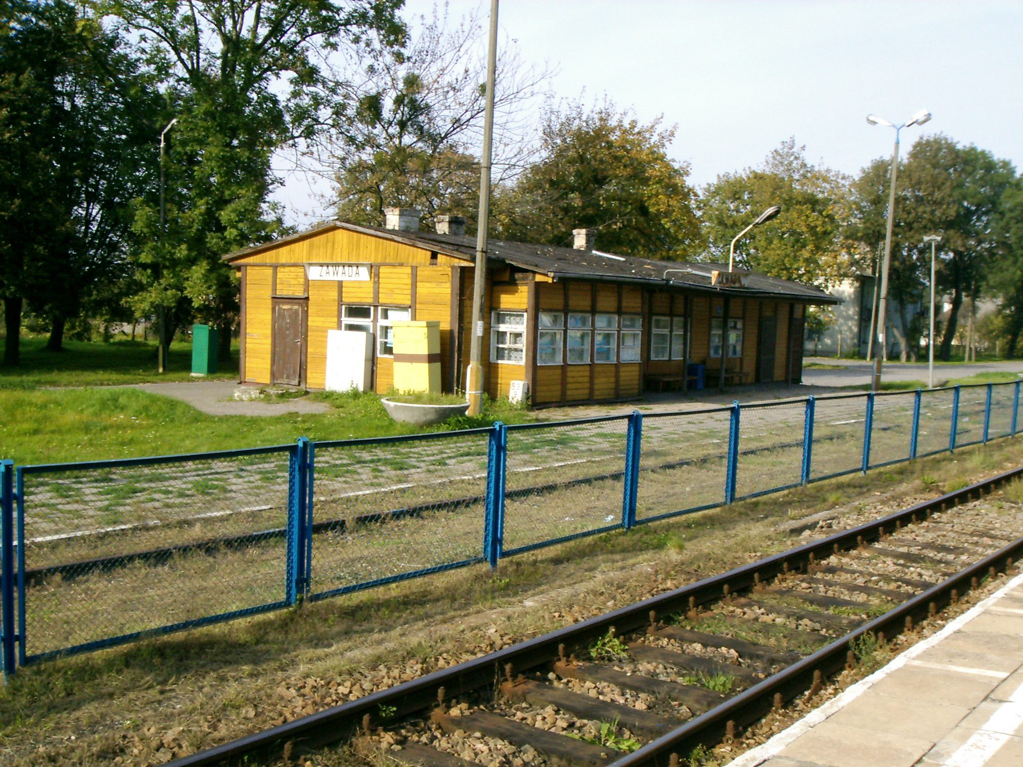 Stacja kolejowa Zawada (powiat zamojski)